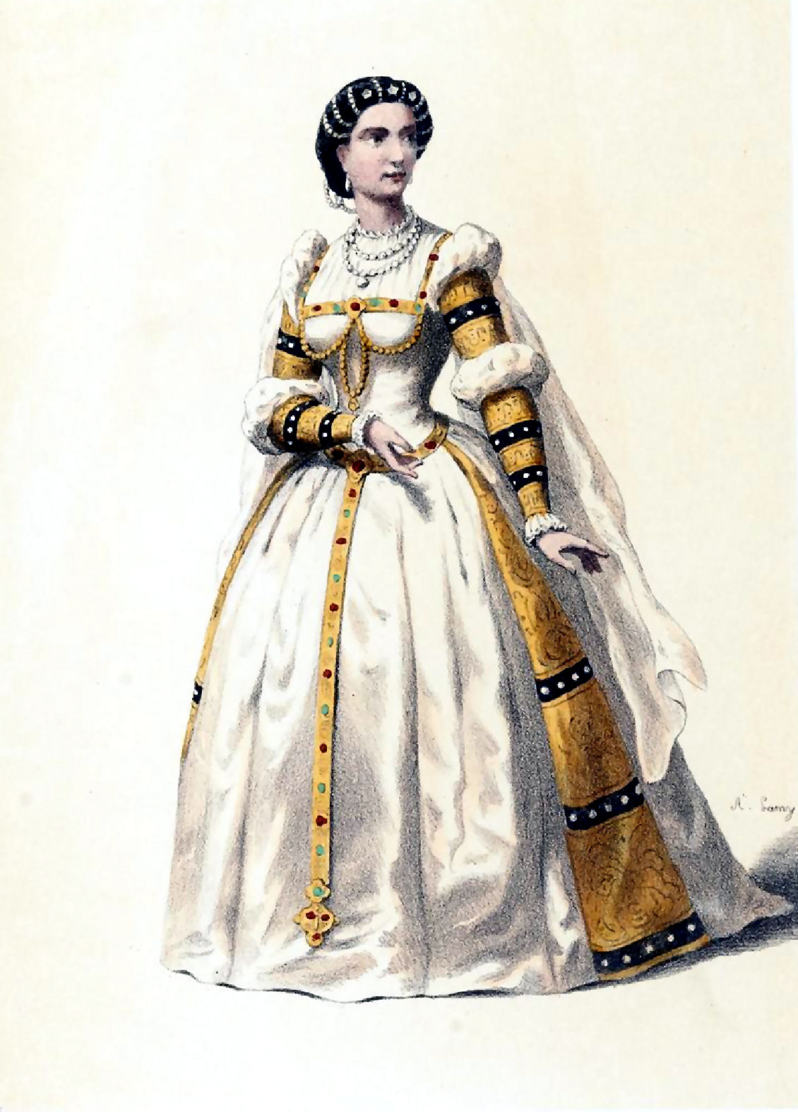 Costume de Marie Battu dans le rôle d'Inès dans L'Africaine de Meyerbeer (acte II)